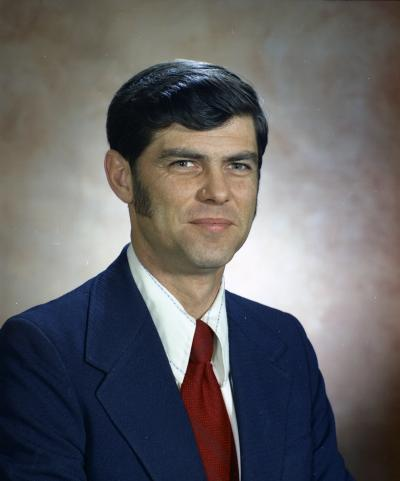 Representative Eugene L. Laughlin, 1973